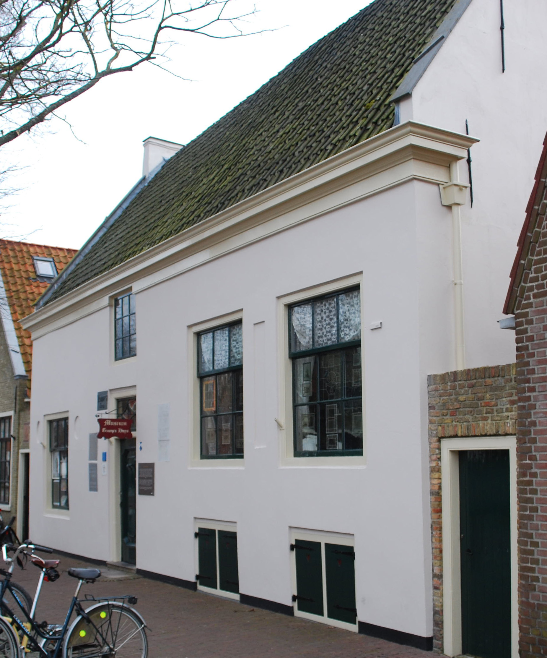 Tromphuis op Vlieland